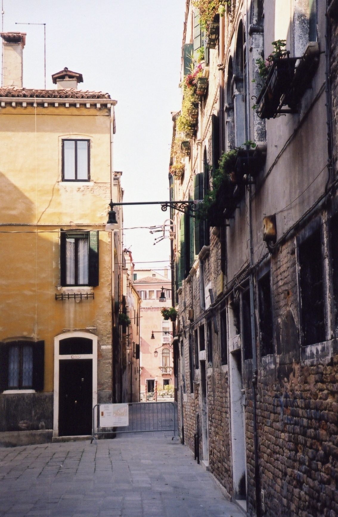 Venice street